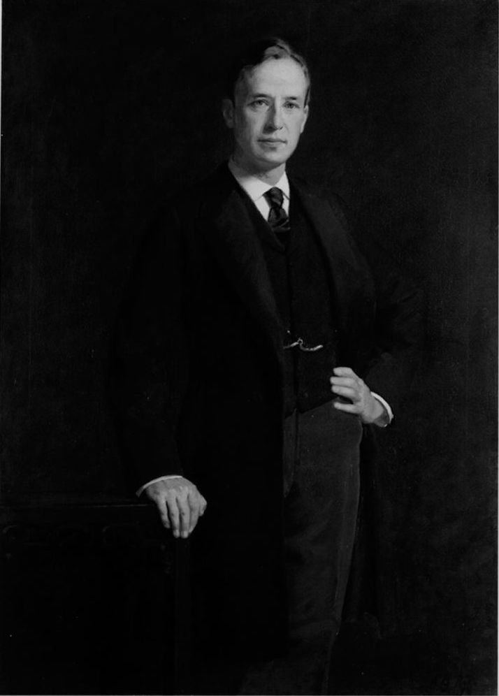 William Eustis Russell (1857-1896)